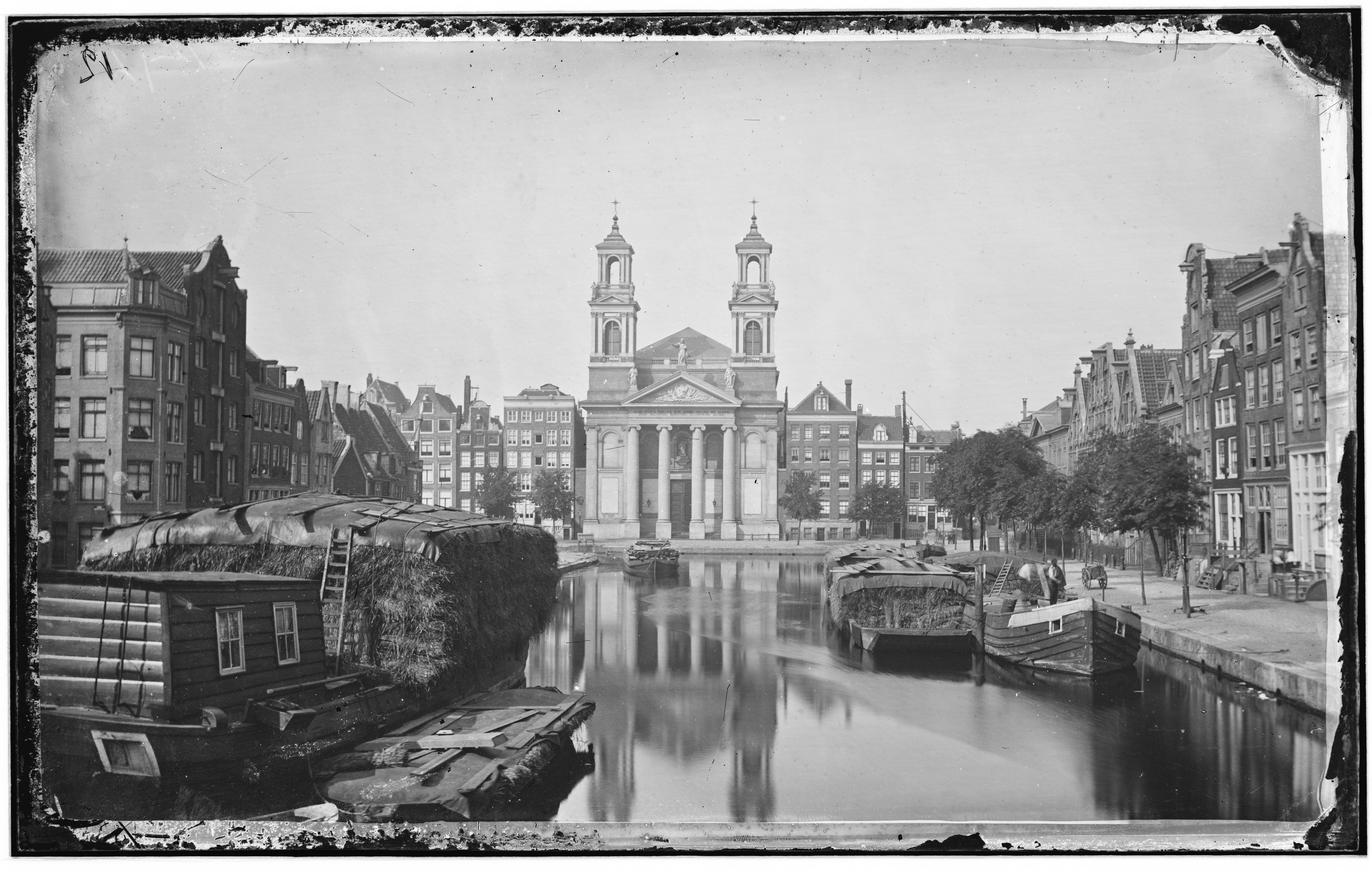 Beschrijving De Leprozengracht gezien naar de Mozes en Aäronkerk Na de demping in 1882 werd dit het Waterlooplein. Oorspronkelijke kabinetfoto uitgegeven door A. Jager. Documenttype foto Vervaardiger Gebroeders Douwes (uitgever) Collectie Collectie Kunsthandel Gebr. Douwes: glasnegatieven Datering 1867 t/m 1882 Geografische naam Leprozengracht Inventarissen Afbeeldingsbestand B00000031514 Generated with Dememorixer